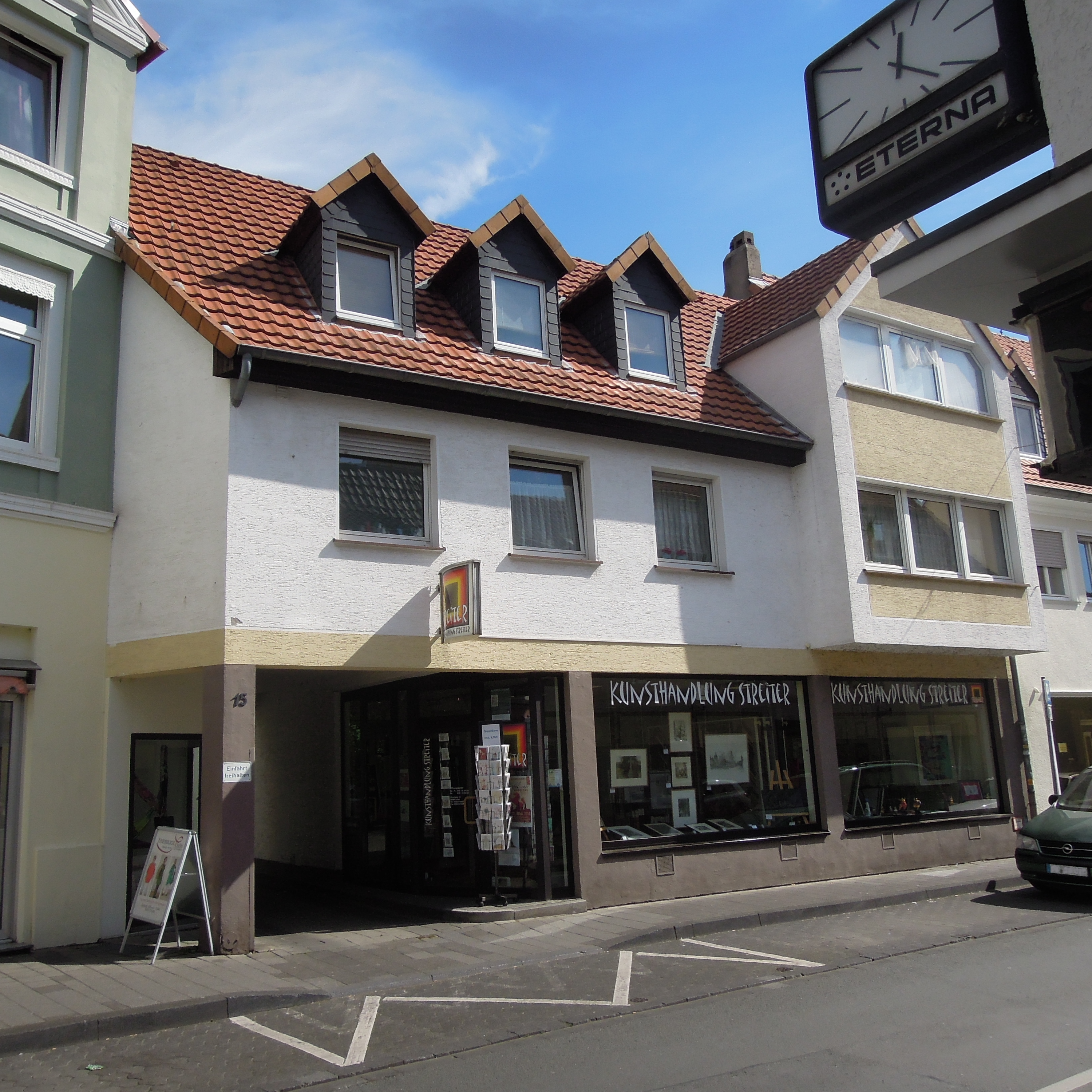 Stolpersteinlage Soest Grandweg 15